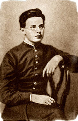 Николай Александрович Морозов (1854 - 1946)